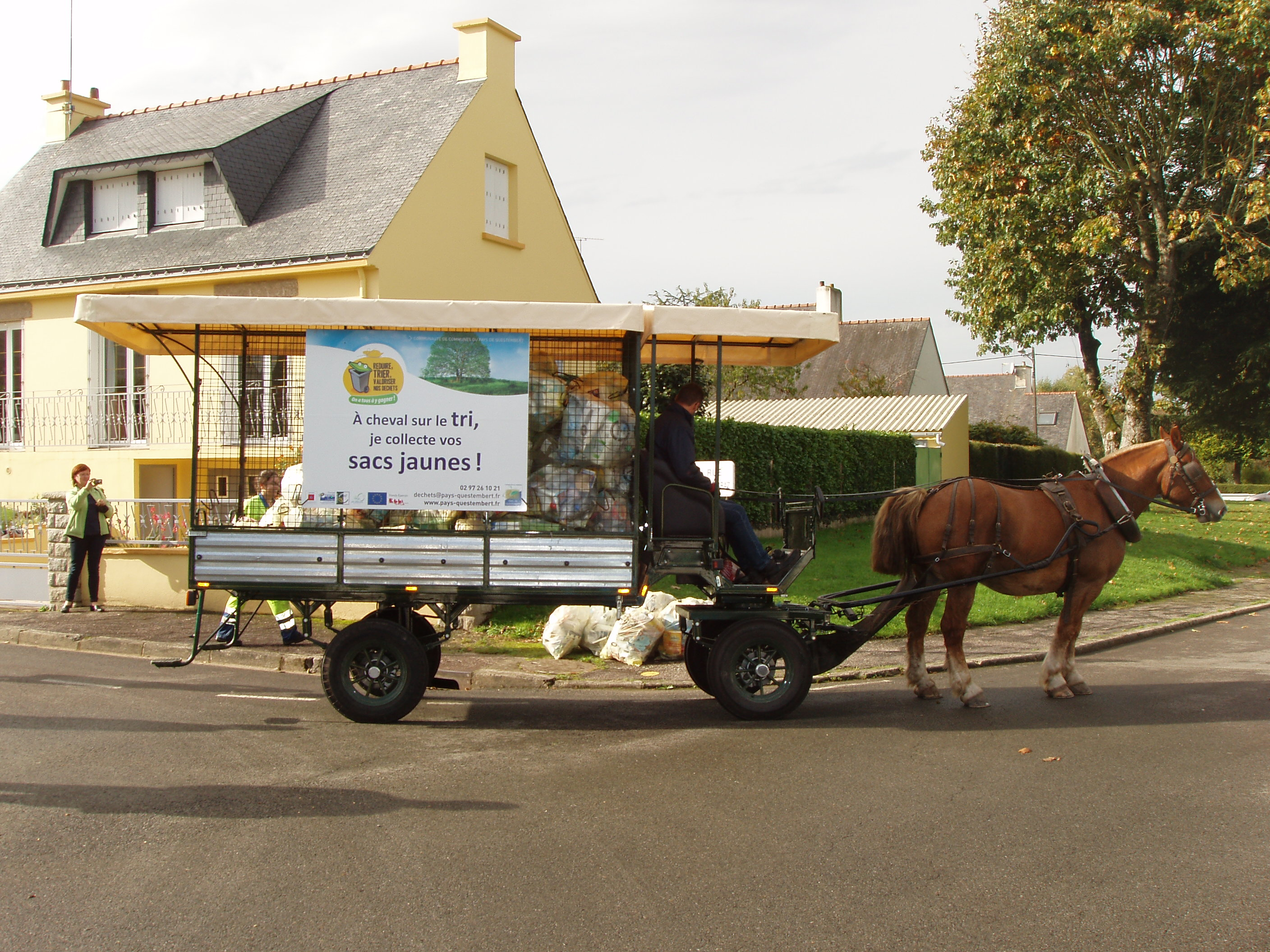 Questembert (Morbihan, France) : Ramassage des déchets par les chevaux.